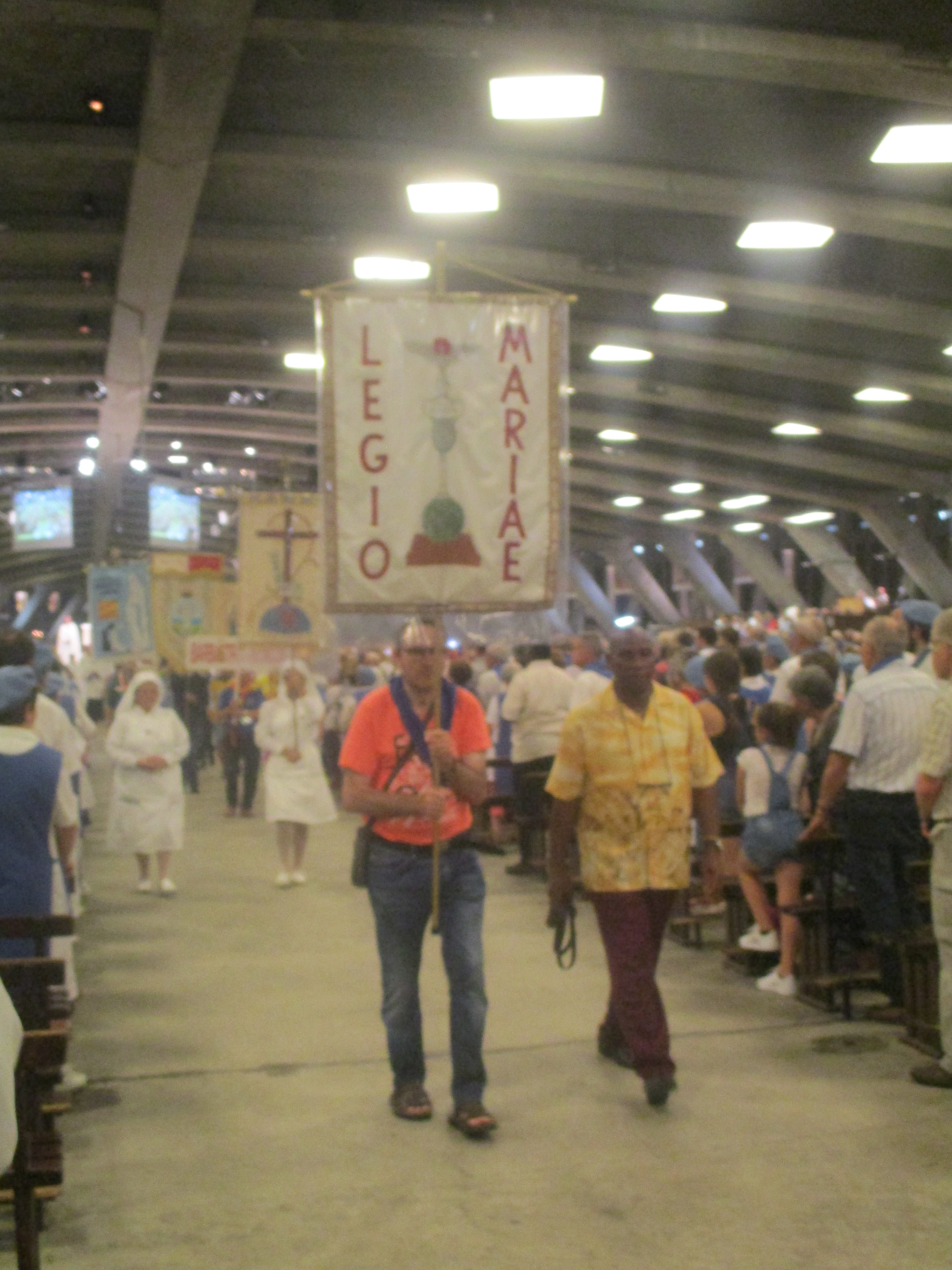 Bannière de la Légion de Marie à la fin de l'office du Très-Saint-Sacrement à la basilique souterraine de Lourdes en août 2019.